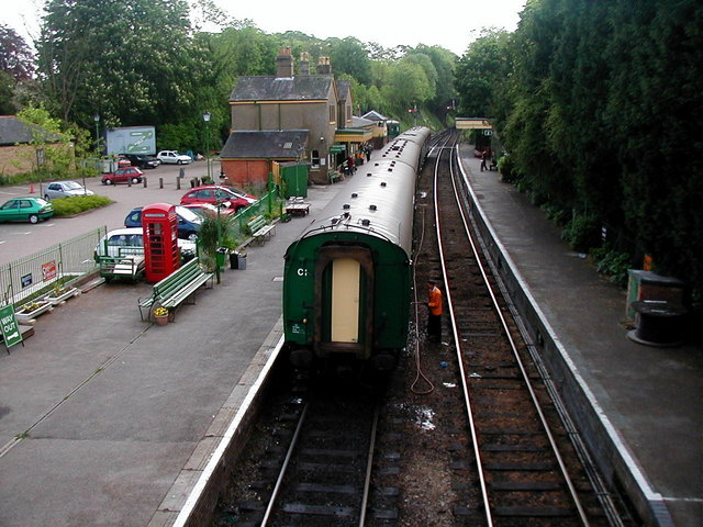 Alresford Station